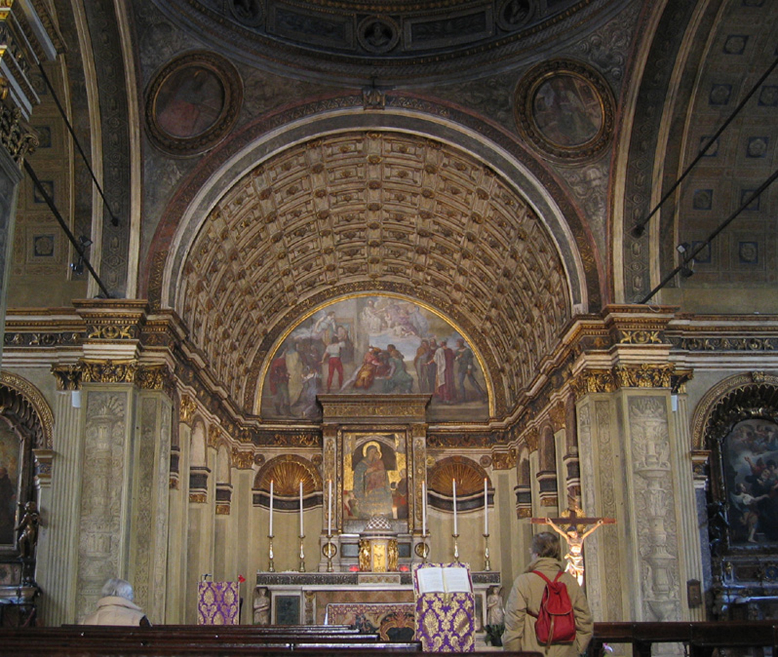 Chiesa di San Satiro a Milano. Abside a trompe-l'oeil di Donato Bramante.